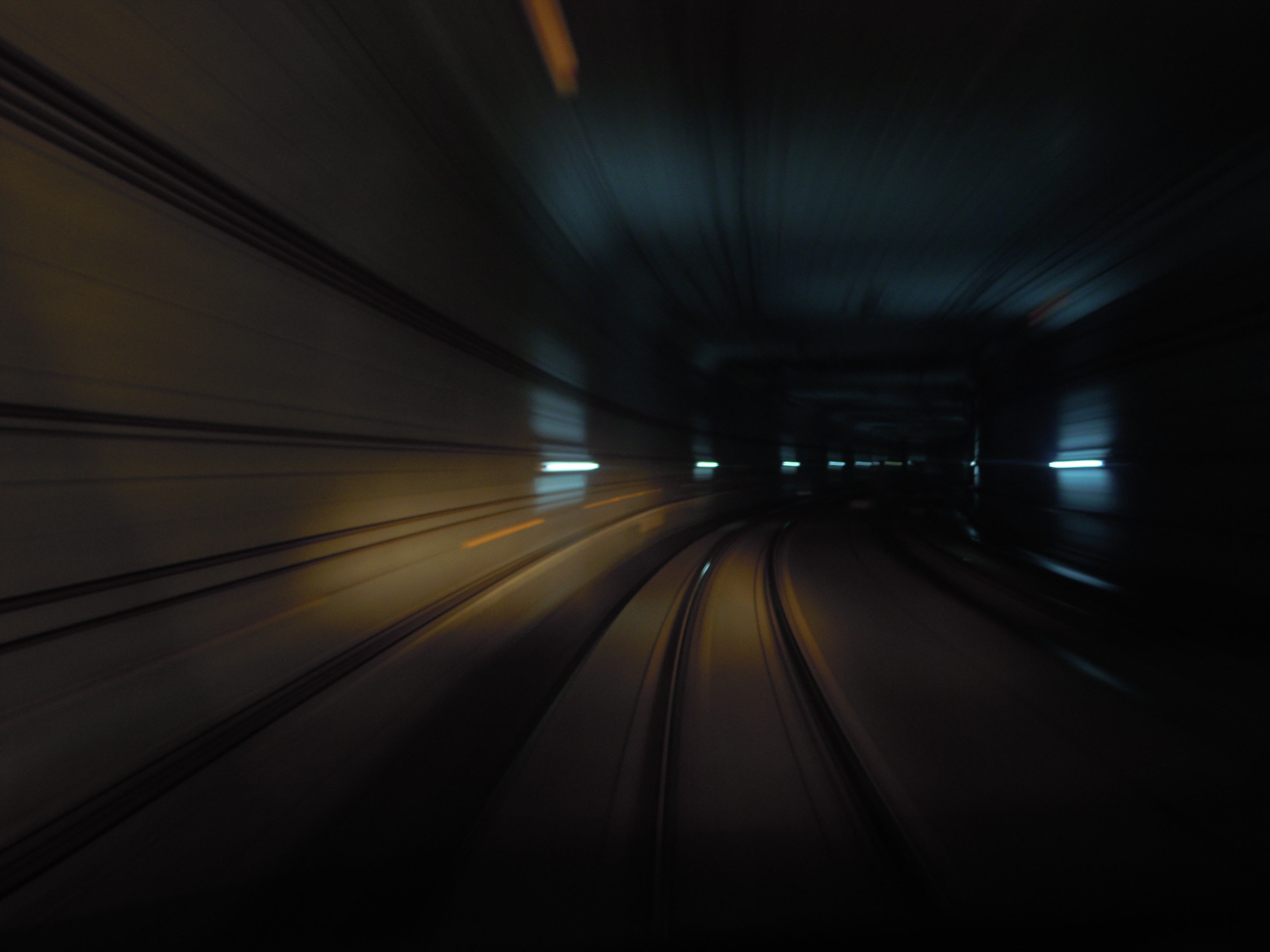 長野電鉄長野線、長野‐市役所前間